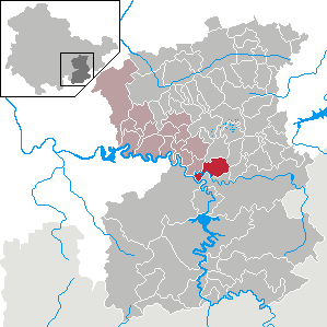 Crispendorf in Thuringia - Saale-Orla-Kreis